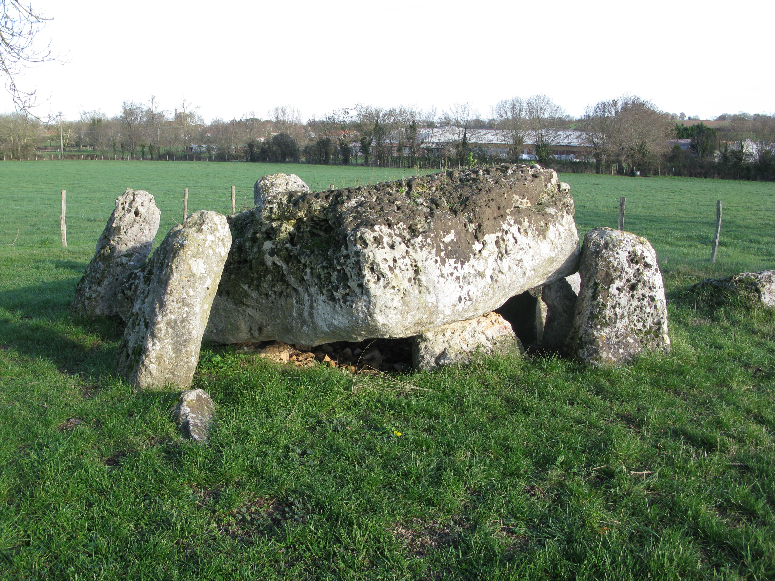 Le dolmen de la pierre levée à La Vallée.